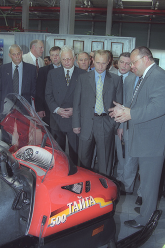 ЯРОСЛАВСКАЯ ОБЛАСТЬ, г. РЫБИНСК. Посещение ОАО «Рыбинские моторы».